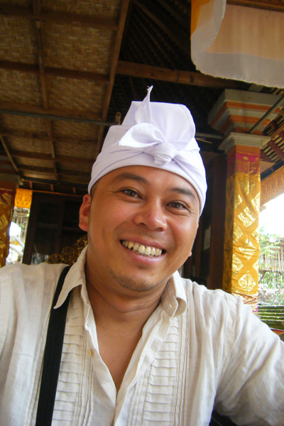 小谷野 哲郎プロフィール写真